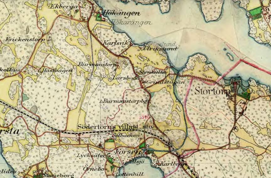 Gårdarna Hökarängen, Larsboda, Burmanstorp, Forsen, Stortorp m.fl. på Häradsekomomiska kartan från 1901